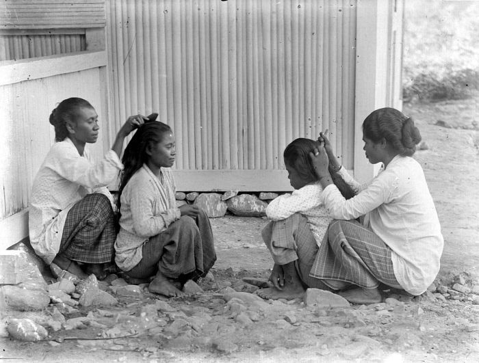 Negatief. Vrouwen luizen elkaar, Buru